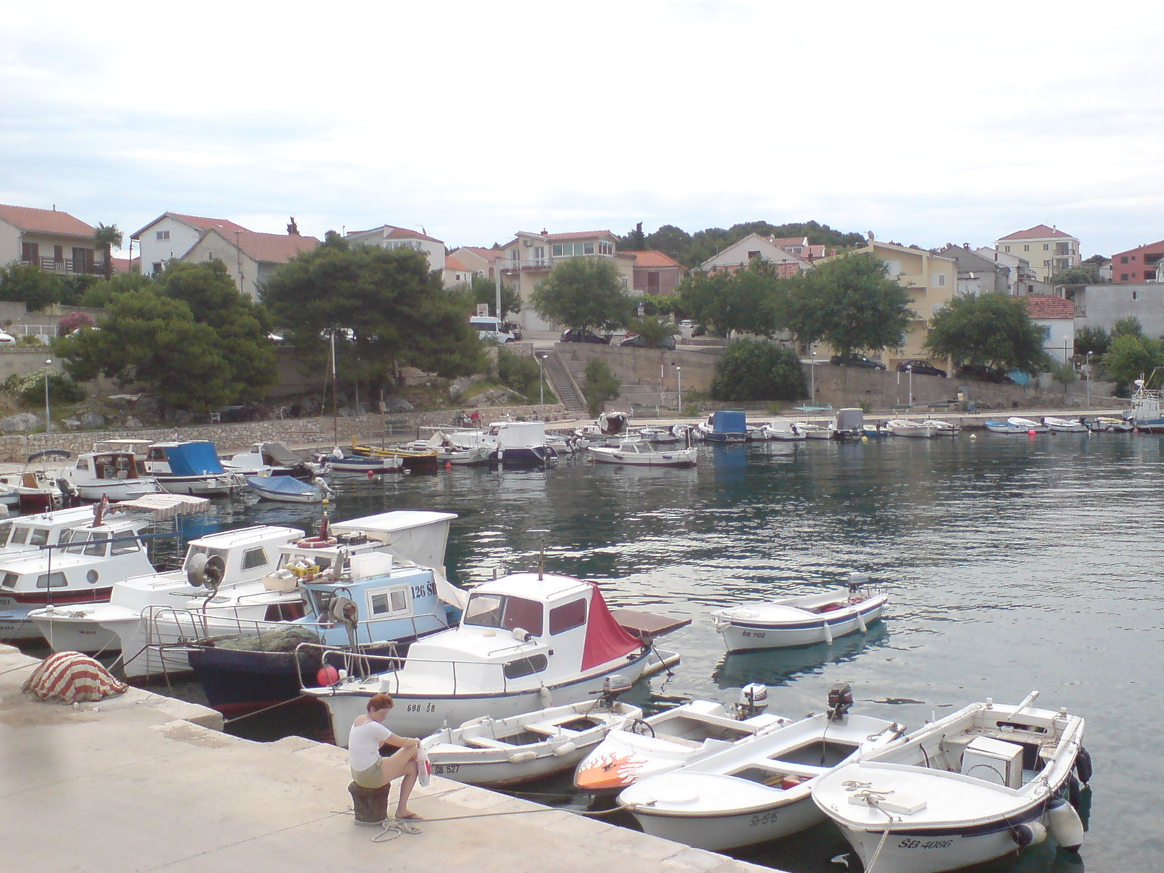 Brodarica port, near Šibenik (Croatia)